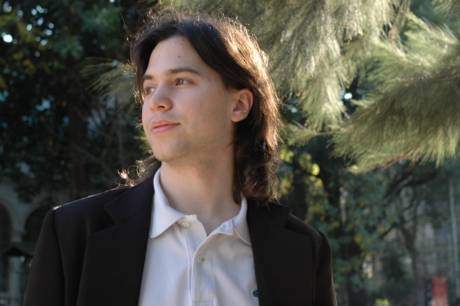 Horacio Lavandera